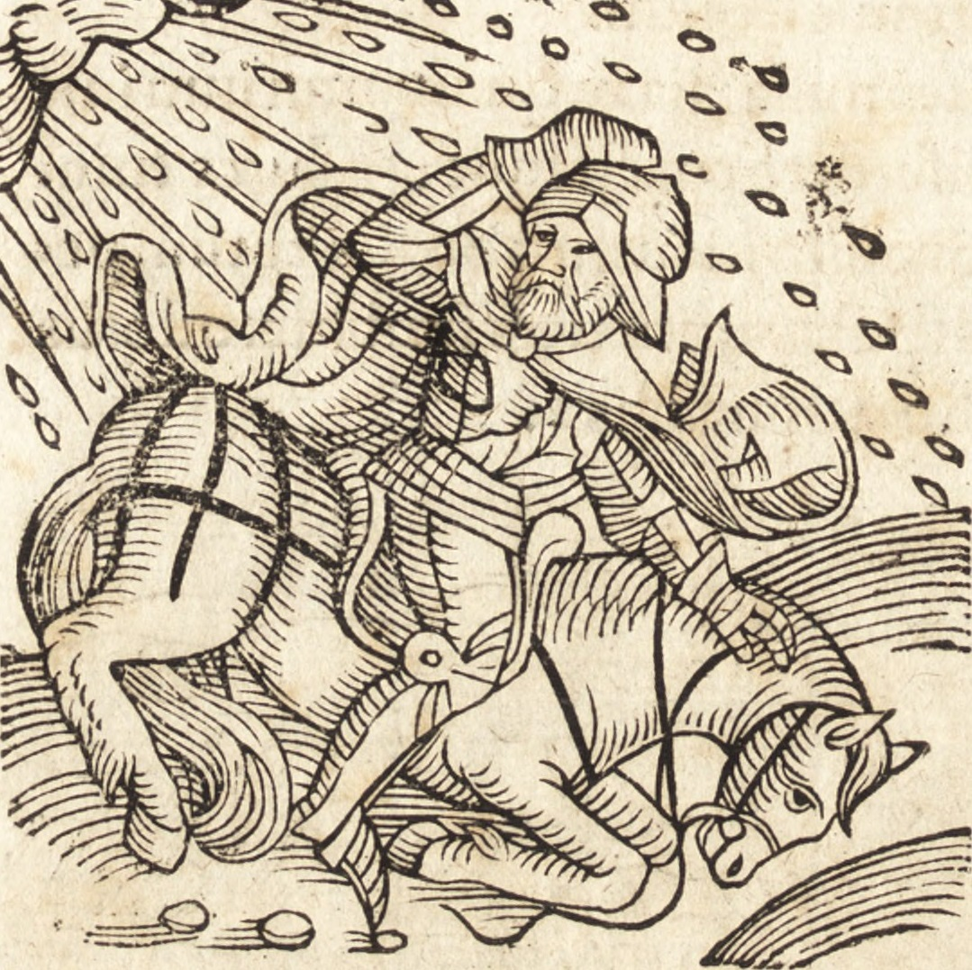 Libre de droit